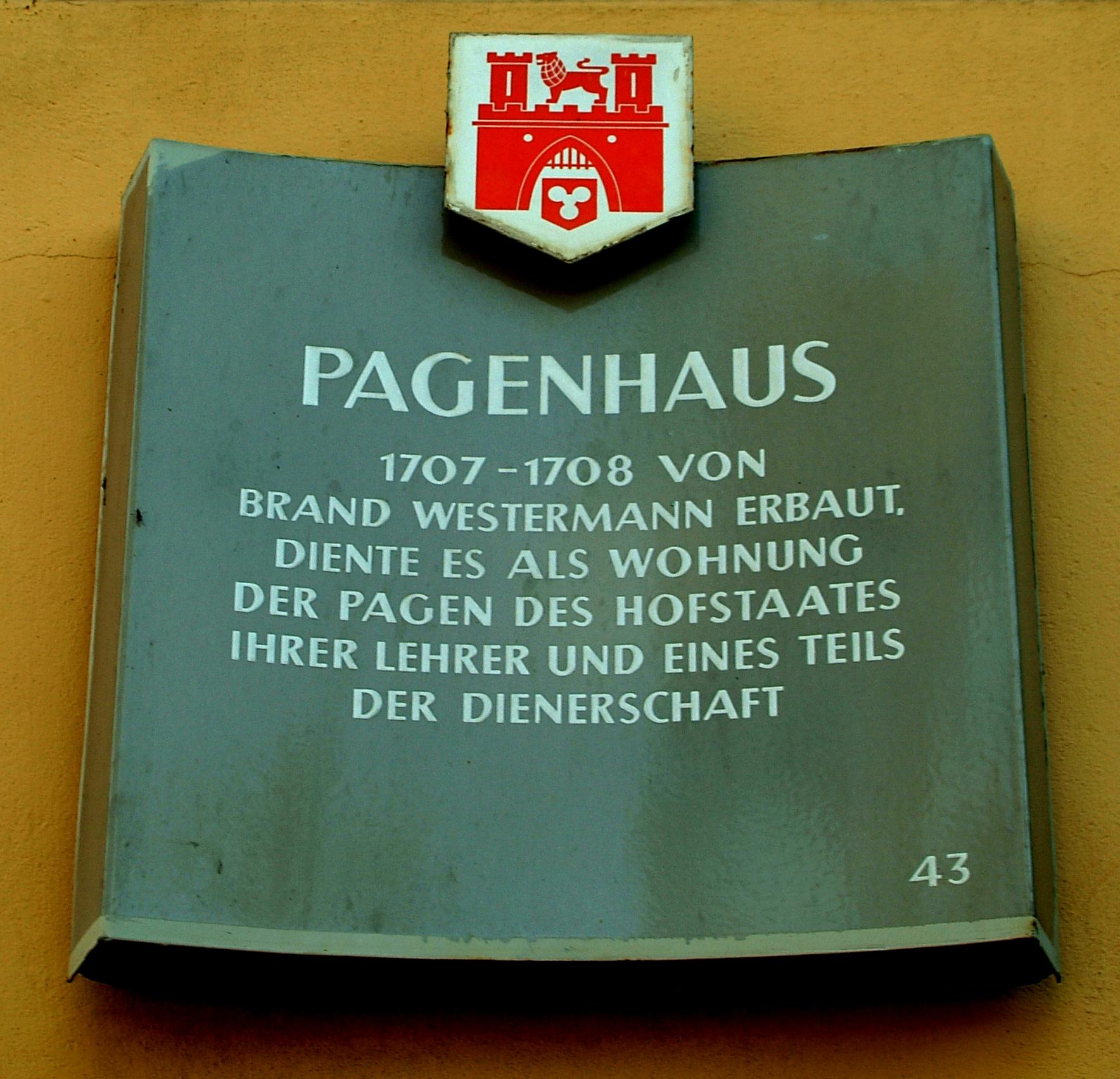 Stadttafel 43 am Pagenhaus in Hannover